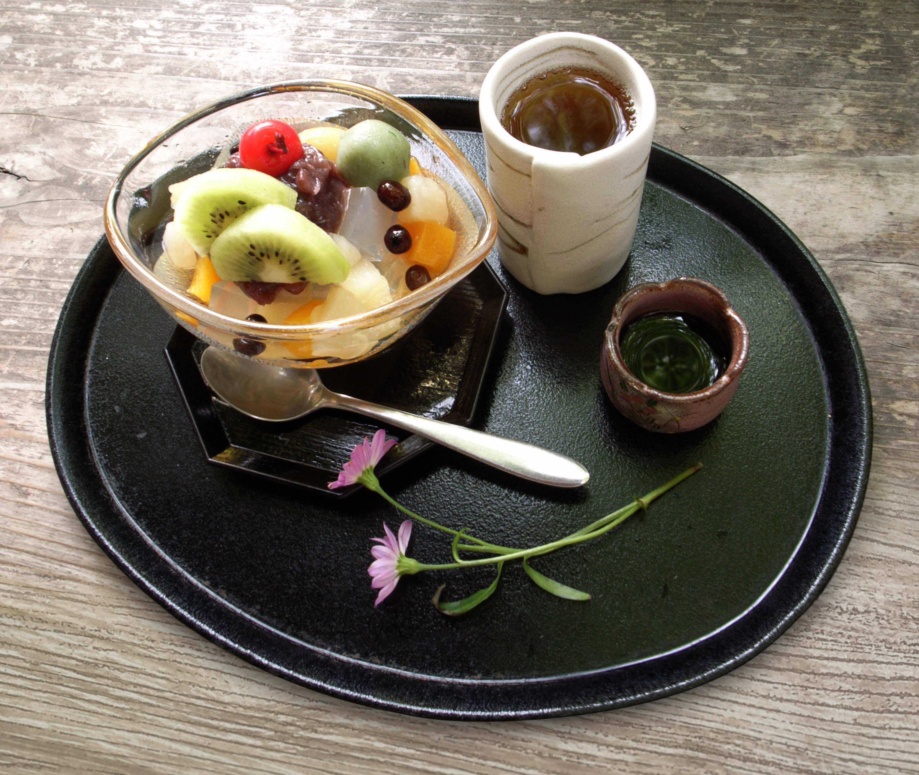 Japanese sweets